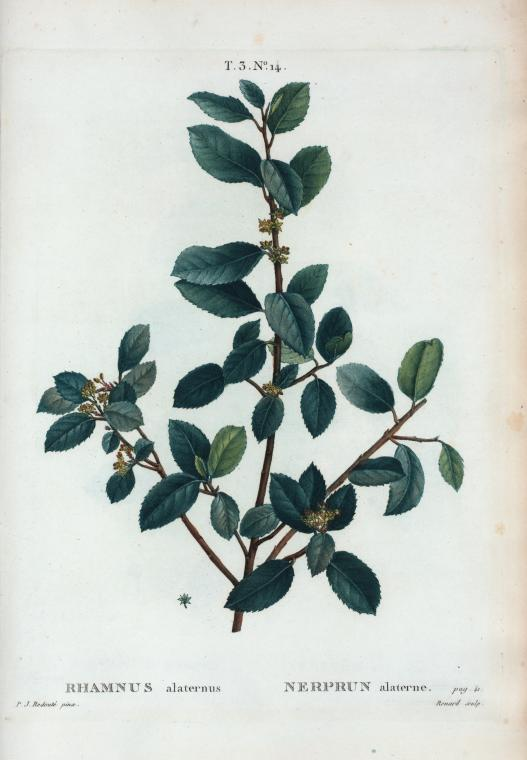 Rhamnus alaternus = Nerprun alaterne.